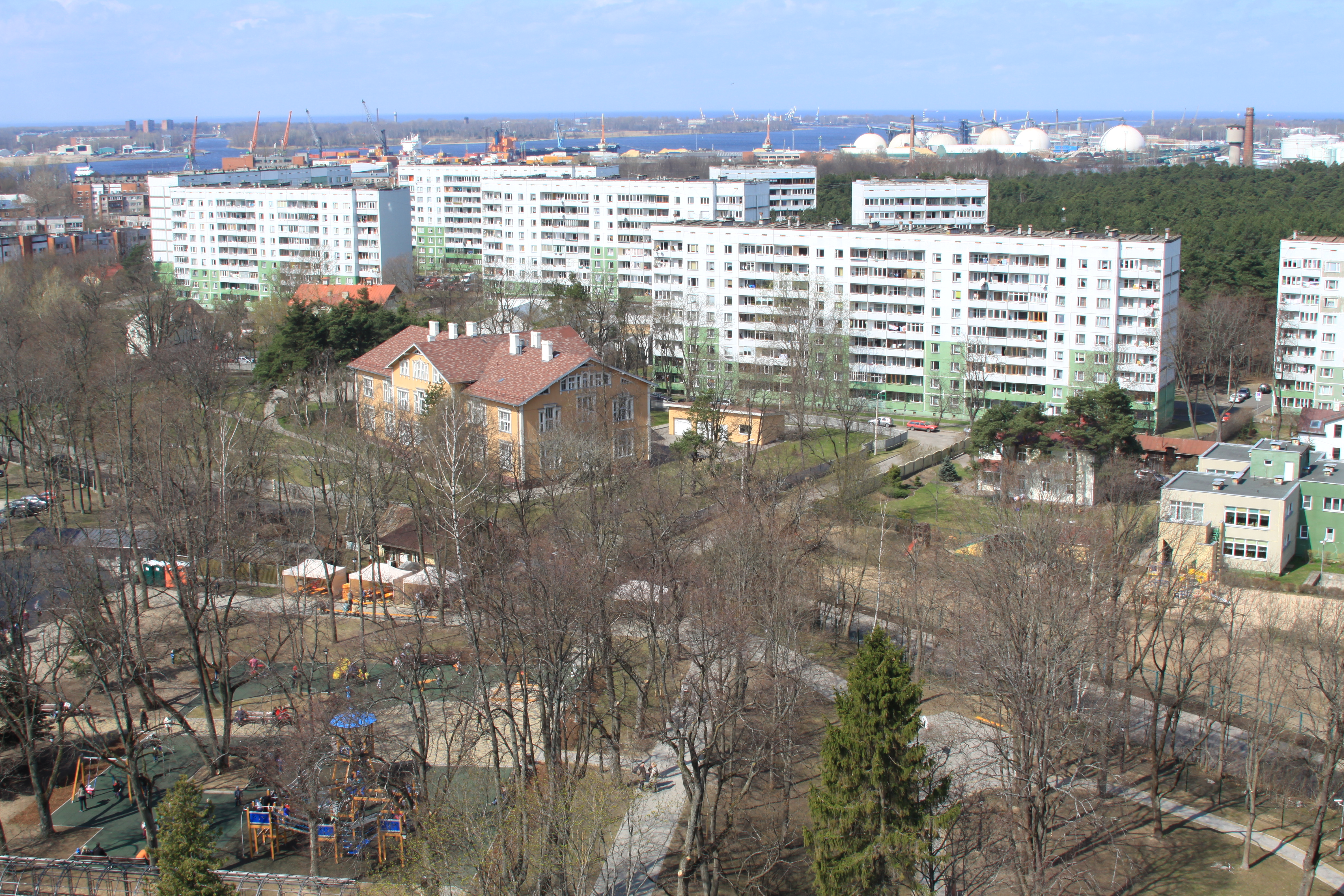 Immeubles du quai du port à Vecmīlgrāvis (voisinage de Riga).